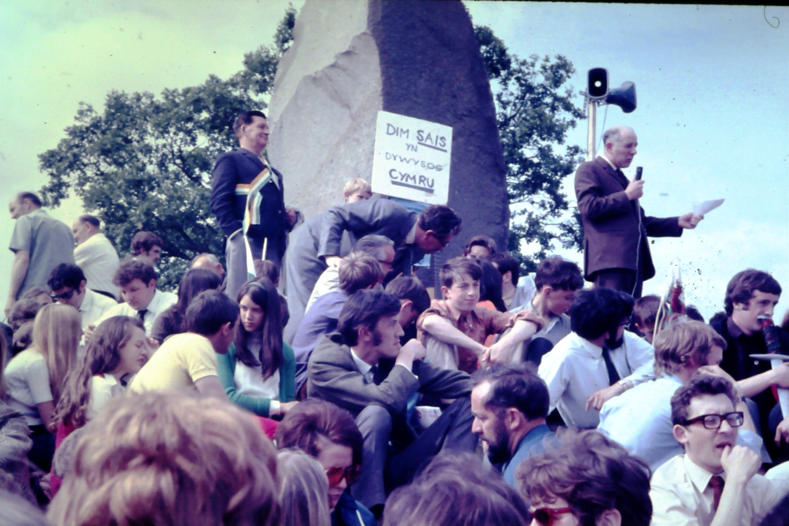 Protest yng Nghilmeri yn erbyn yr arswisgiad.